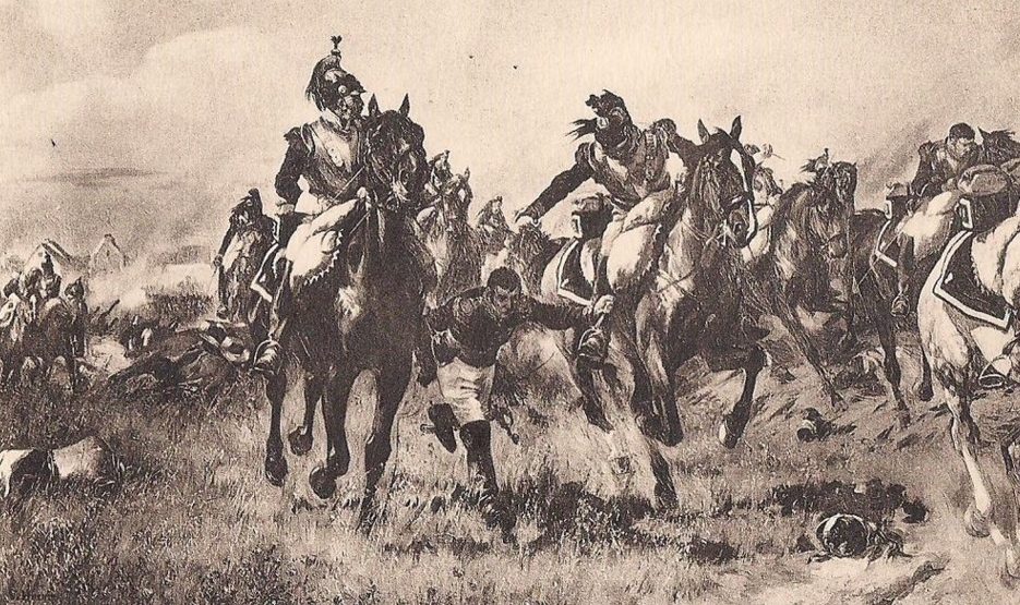 Le général Kellermann à la bataille des Quatre-Bras, 16 juin 1815. Kellermann, qui vient de mener la charge de ses cuirassiers contre les Alliés, a son cheval tué sous lui, et doit regagner les lignes françaises accroché aux étrivières de deux de ses hommes.